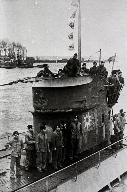 Wimpel künden den Erfolg. Schwer umkämpft sind die Zahlen auf den kleinen weissen Wimpeln, die das heimkehrende Untersee-Boot stolz gesetzt hat. Es ist jedes Mal hart auf hart gegangen. 17.1.41 KG.